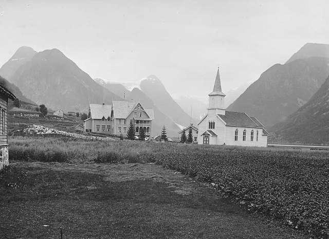 Fjærland kyrkje slik ho såg ut før ho vart ombygd på 1930-talet. Til venstre Hotel Mundal.